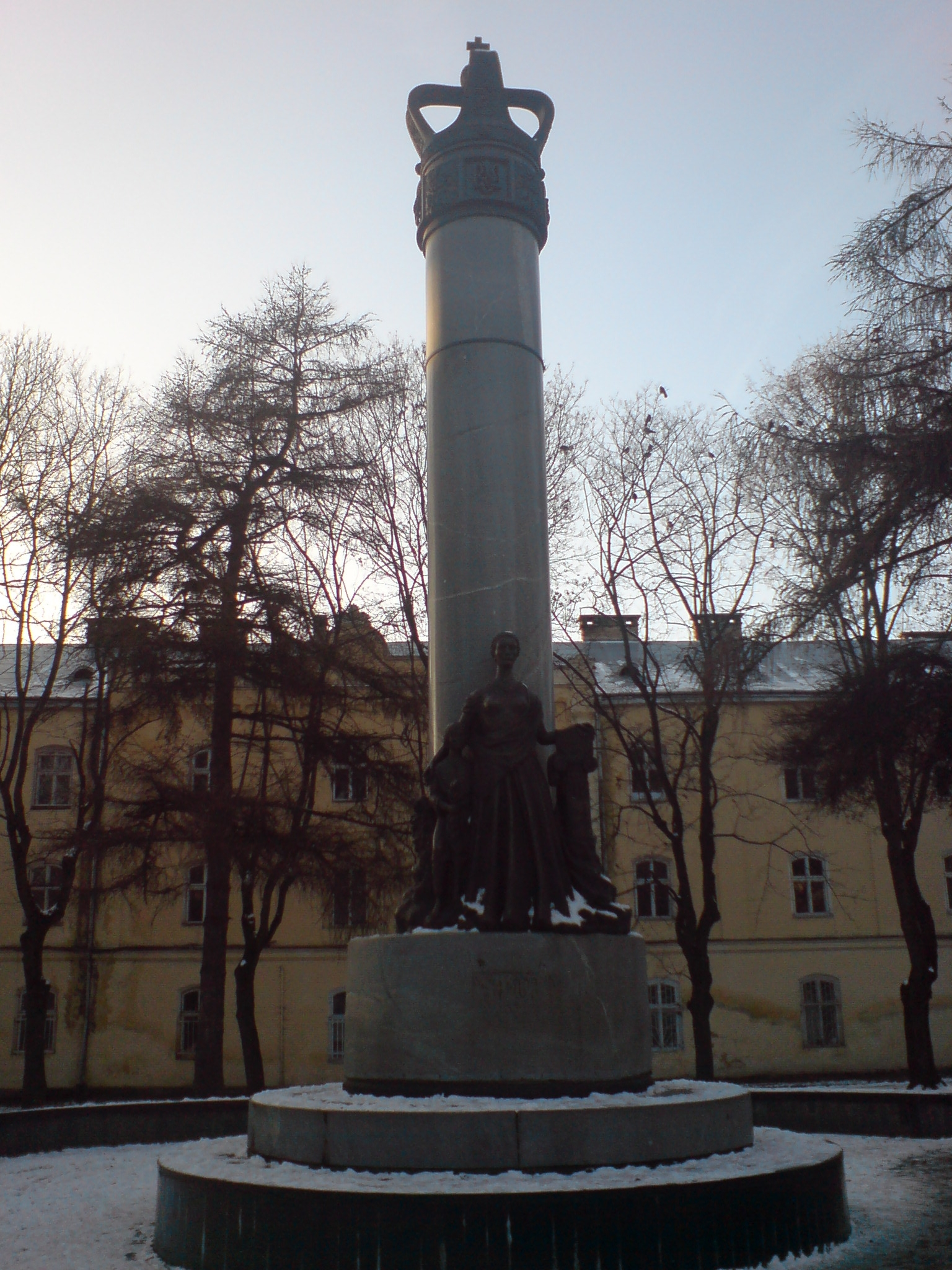 Proswitadenkmal, Lviv